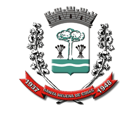 Brasão de Armas do município goiano de Santa Helena de Goiás, Brasil.